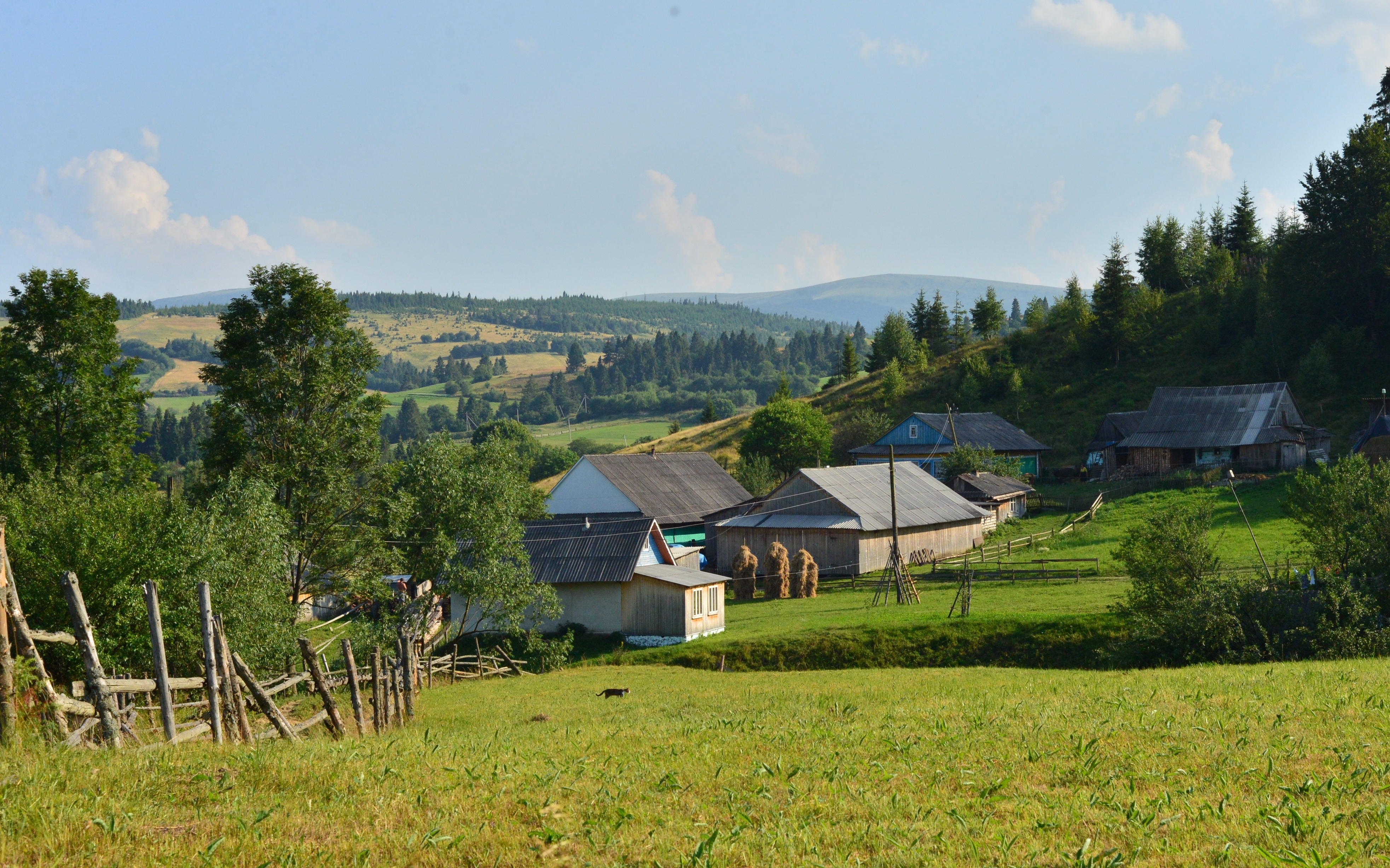 Краєвиди села Карпатське